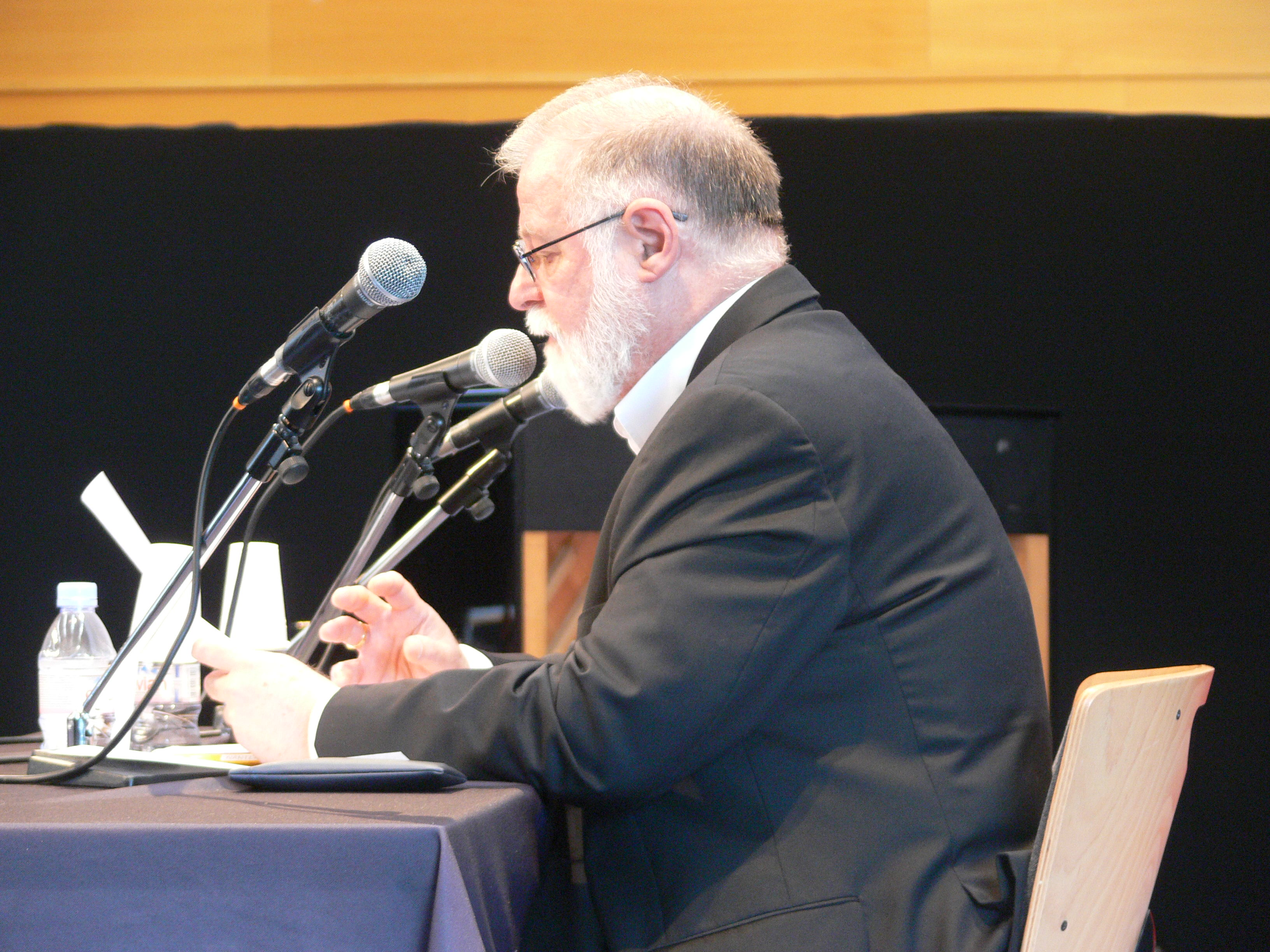 Alberto Manguel (Nantes 2013, festival Atlantide)